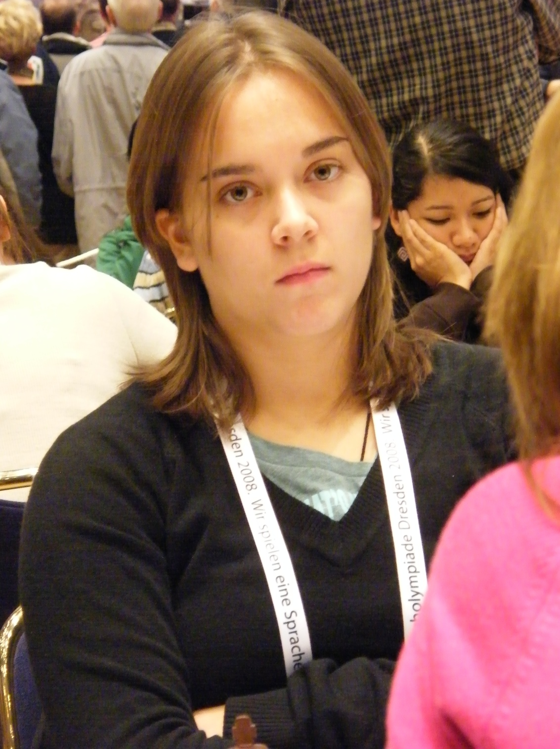 Ana Filipa Baptista bei der 38. Schacholympiade in Dresden 2008